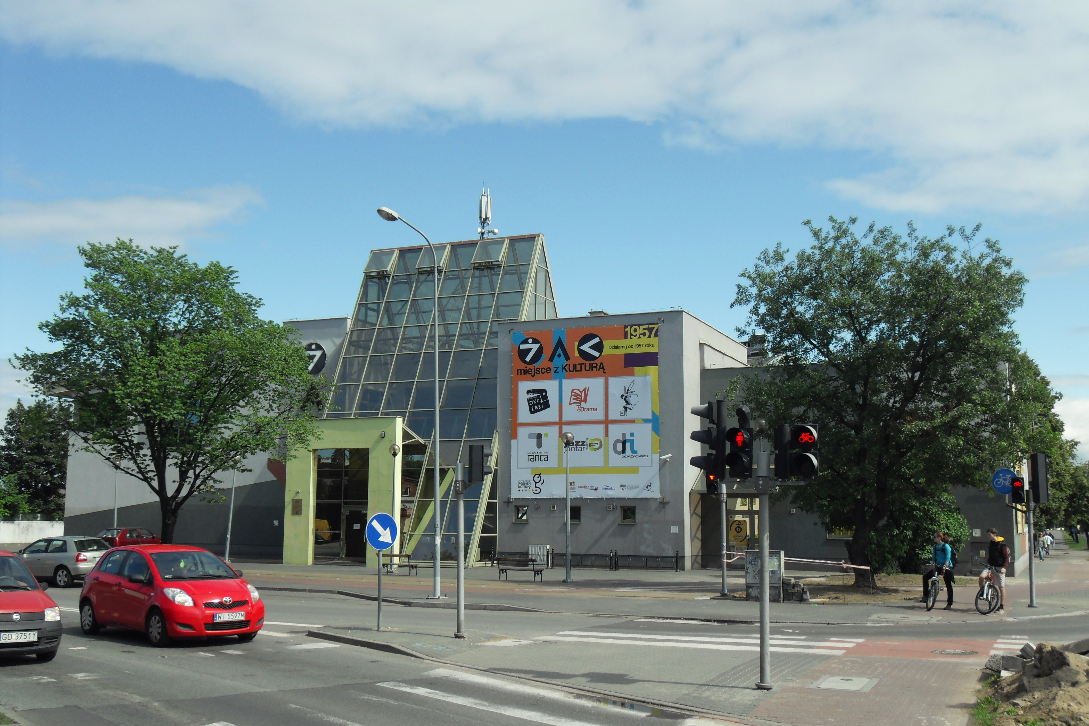 Gdańsk Wrzeszcz Górny. Klub (nowy) "Żak", al. Grunwaldzka 195/197.